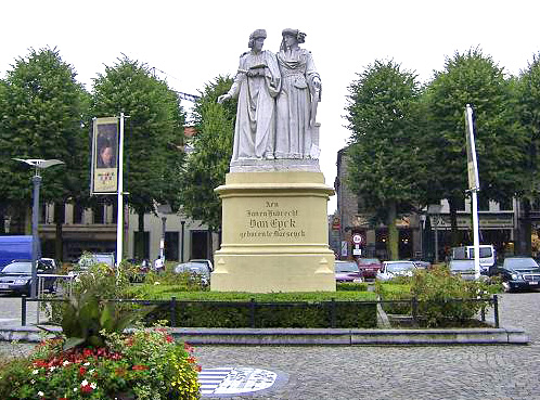 Sujet:Maartplaz zu Maaseik mam Van Eyck-Monument Source:Eege Foto vum Begruiker:TeunSpaans